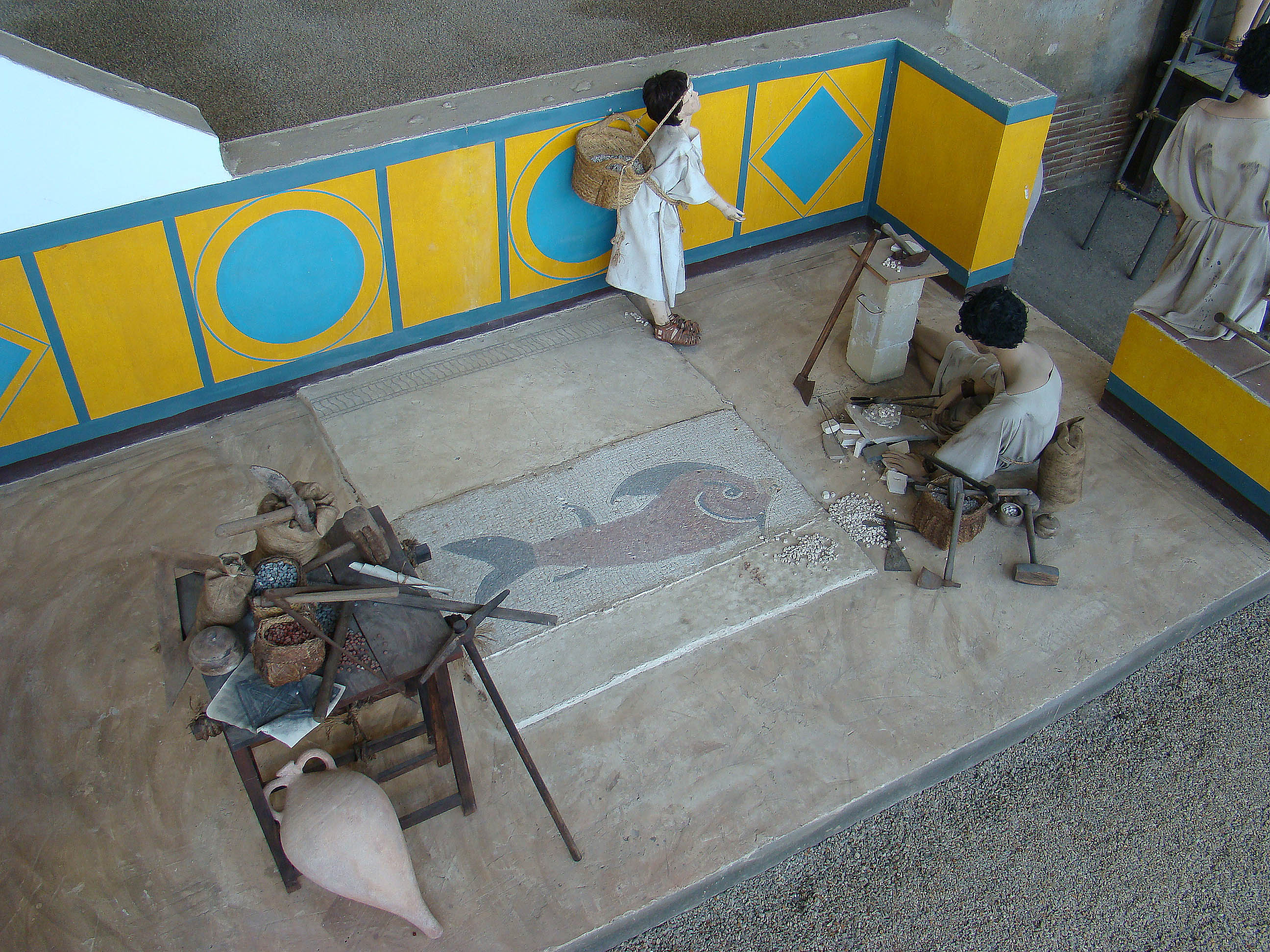 Villa romana de Almenara de Adaja, provincia de Valladolid (España). Recreación de los obreros que fabrican los mosaicos.